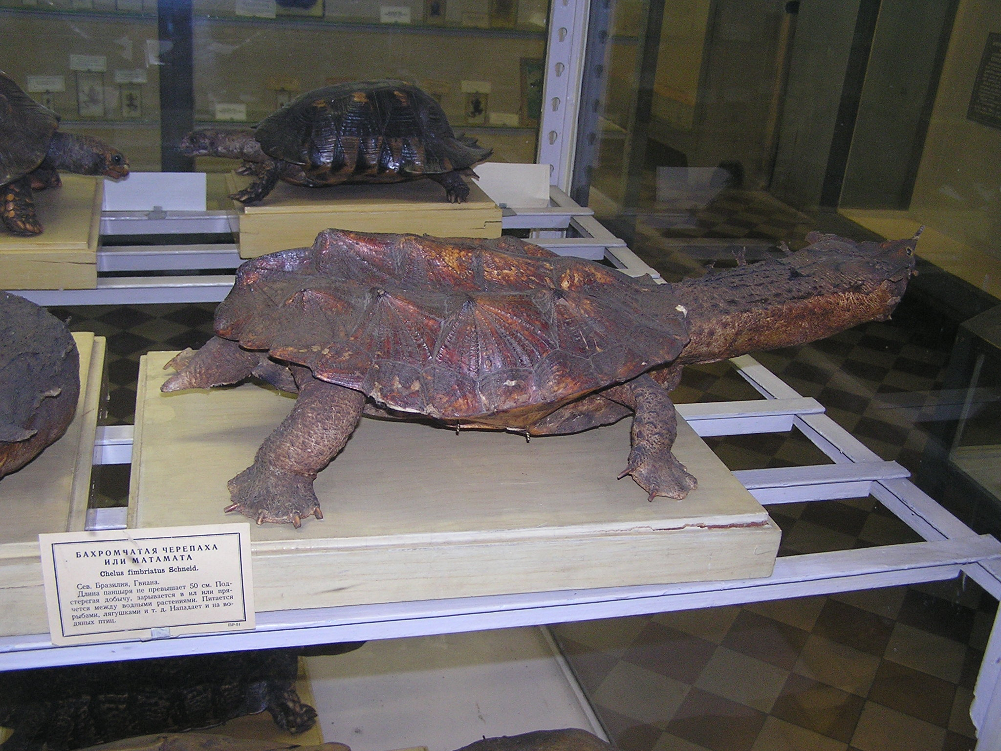 Зоологический музей в Санкт-Петербурге. Бахромчатая черепаха